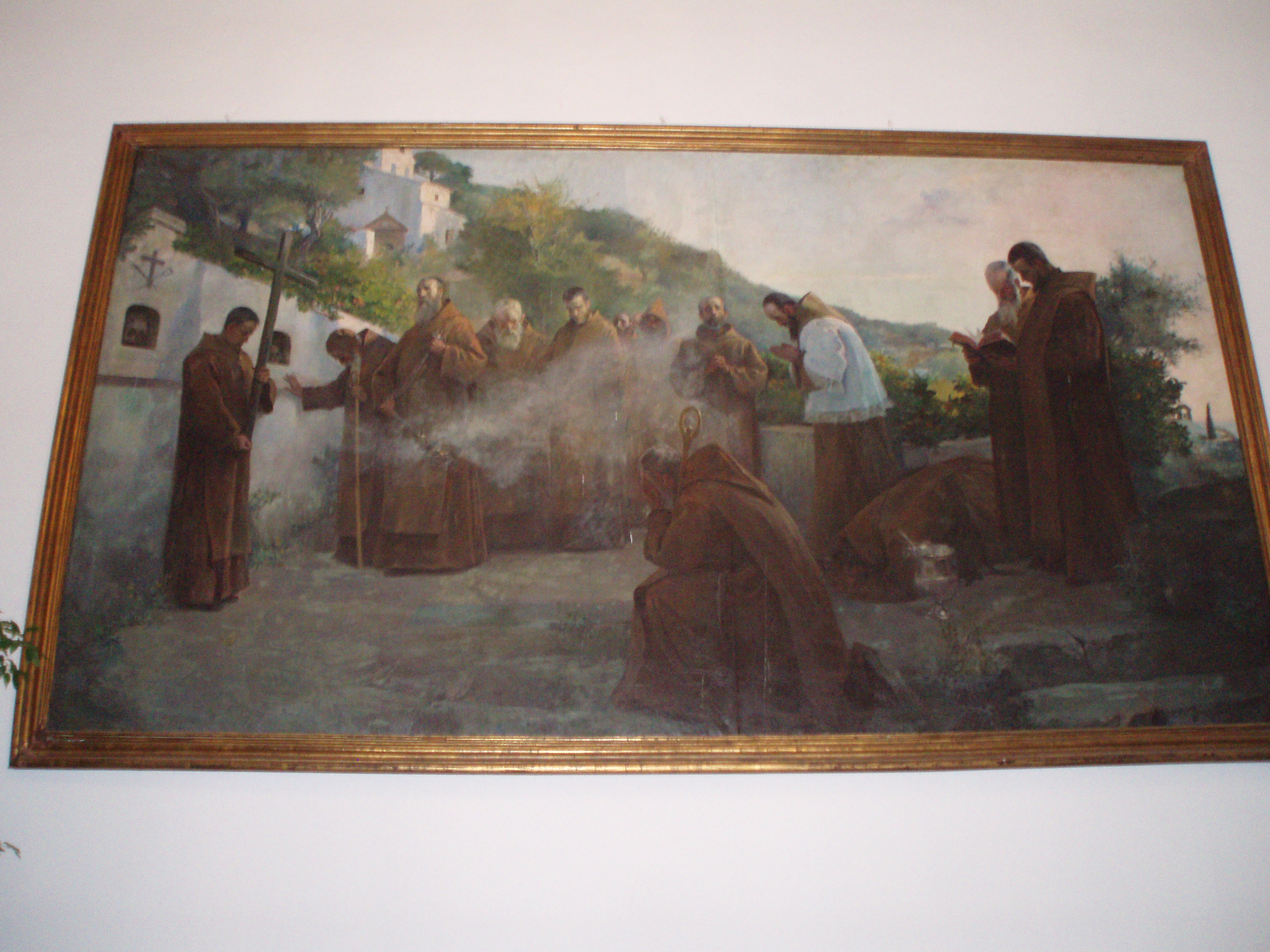 "Plegaria en las ermitas de Córdoba". Lienzo de Tomás Muñoz Lucena, con el que consiguió la primera medalla de la Exposición Nacional de 1901. Se encuentra colocado en las escaleras que comunican el claustro del antiguo Convento de la Merced de Córdoba con la planta superior del edificio.